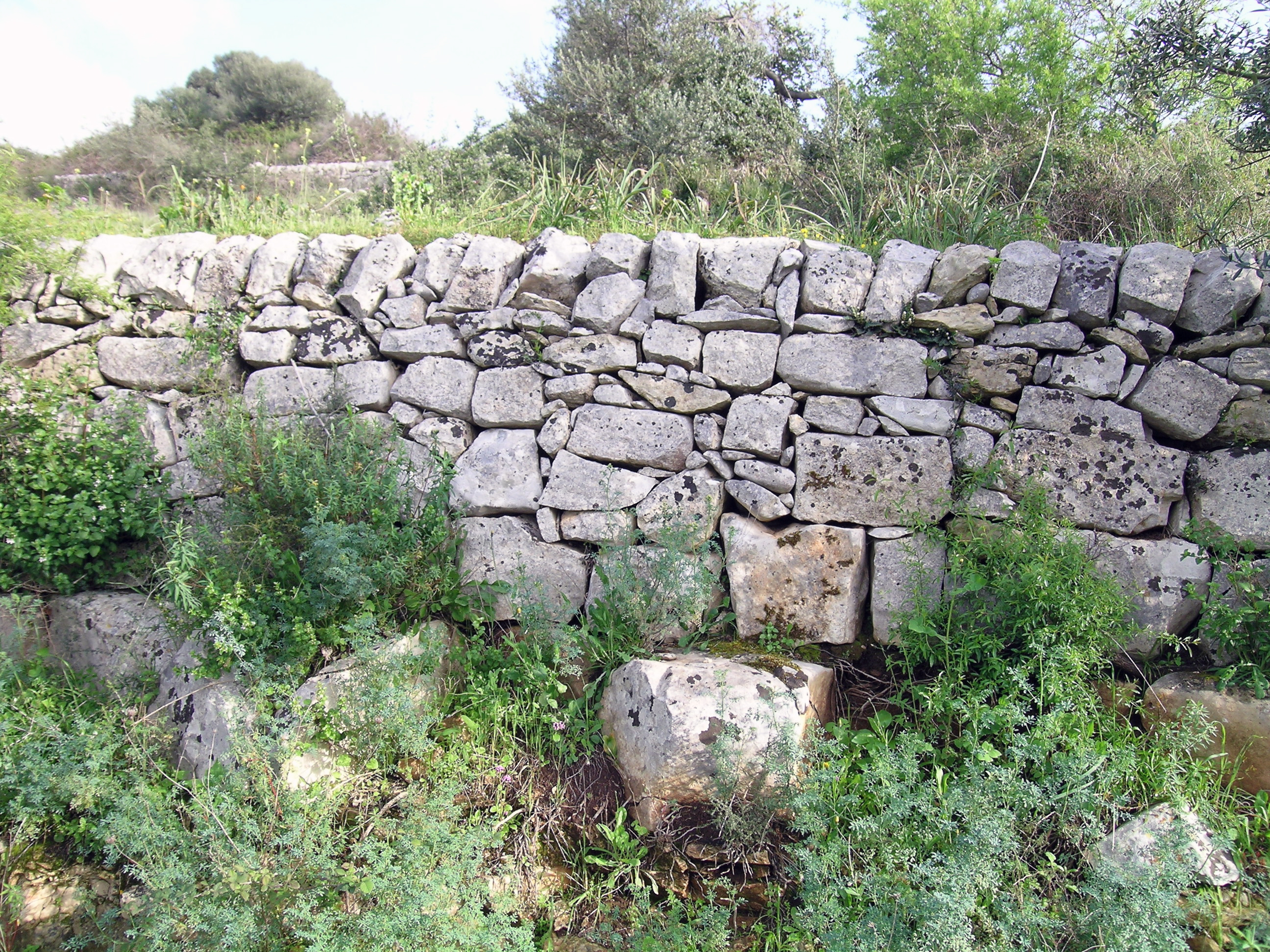 muretto a secco